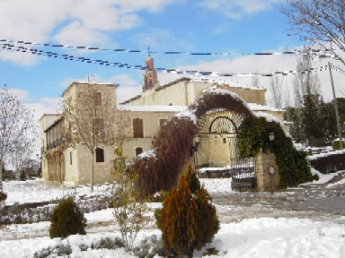 Virgen de la Viñas Foto de la ermita de la Virgen de las Viñas.